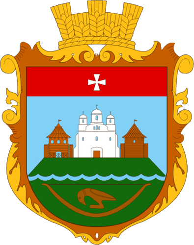 герб Зимнівської сільської об’єднаної територіальної громади